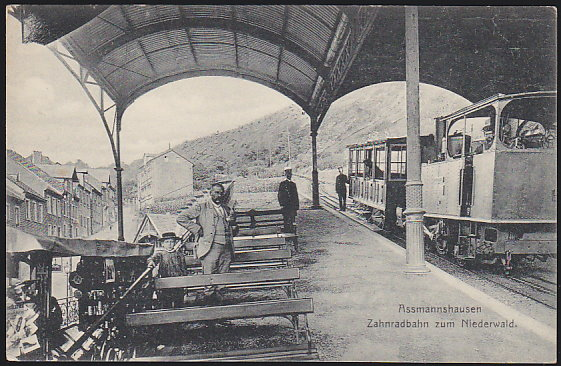 Talbahnhof der zwischen 1885 und 1917 verkehrenden Zahnradbahn von Assmannshausen zum Jagdschloss Niederwald